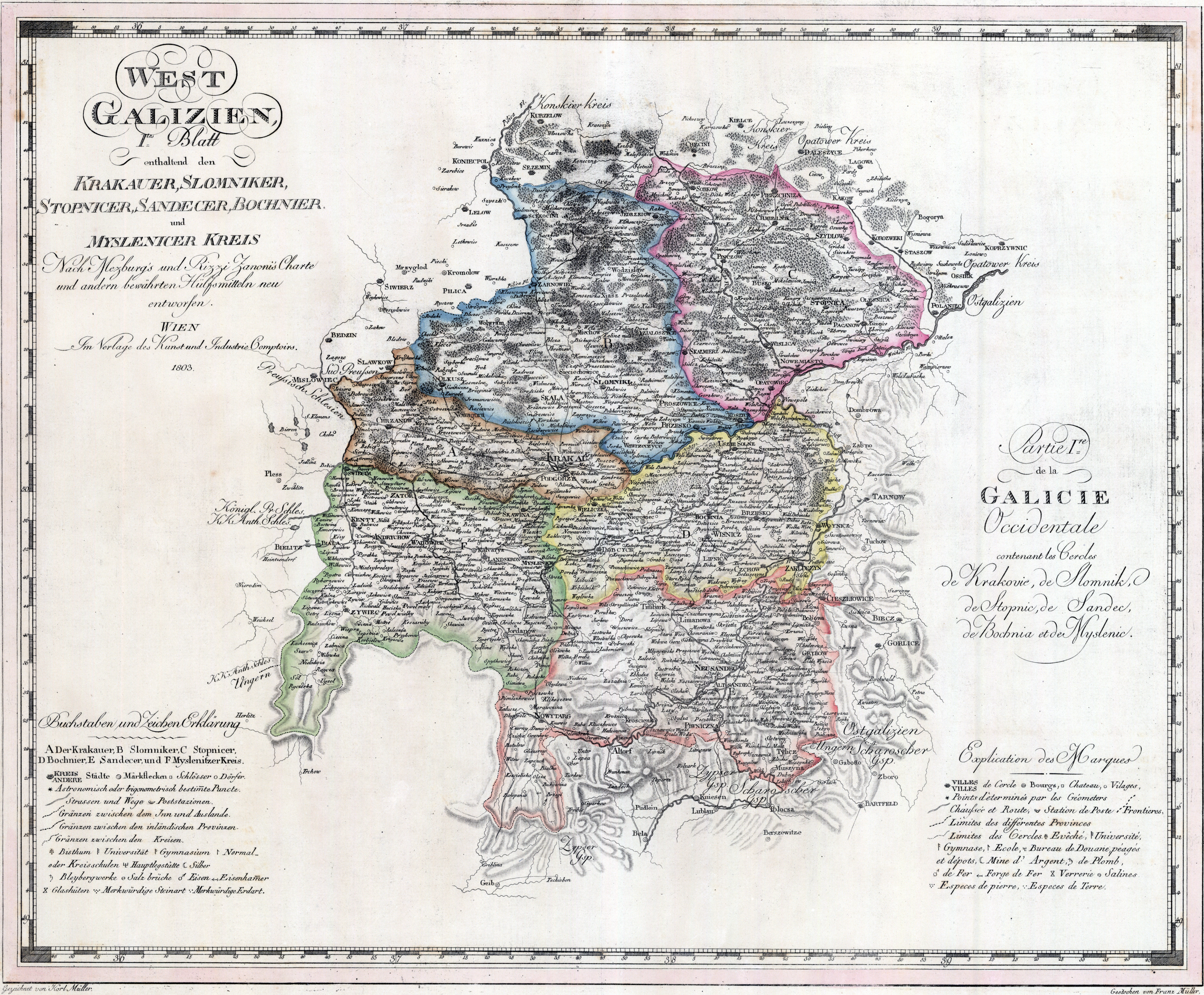 Mapa Nowej Galicji (Galicji Zachodniej) - karta nr 1 - cyrkuły: krakowski, słomnicki, stopnicki. Na mapie ukazano także cyrkuły: myślenicki, bocheński, nowosądecki, które nie były częścią Nowej Galicji i już przed 1803 podlegały Gubernium Galicji we Lwowie. Mapa ukazuje podział administracyjny według stanu na początek 1803, przed reformą z maja 1803. Opis oryginalny: West-Galizien : nach Mezburg's und Rizzi Zanoni's Charte und andern bewährten Hülfsmitteln neu entworfen. 1.tes Blatt, enthaltend den Krakauer, Slomniker, Stopnicer, Sandecer, Bochnier und Myslenicer Kreis [1]